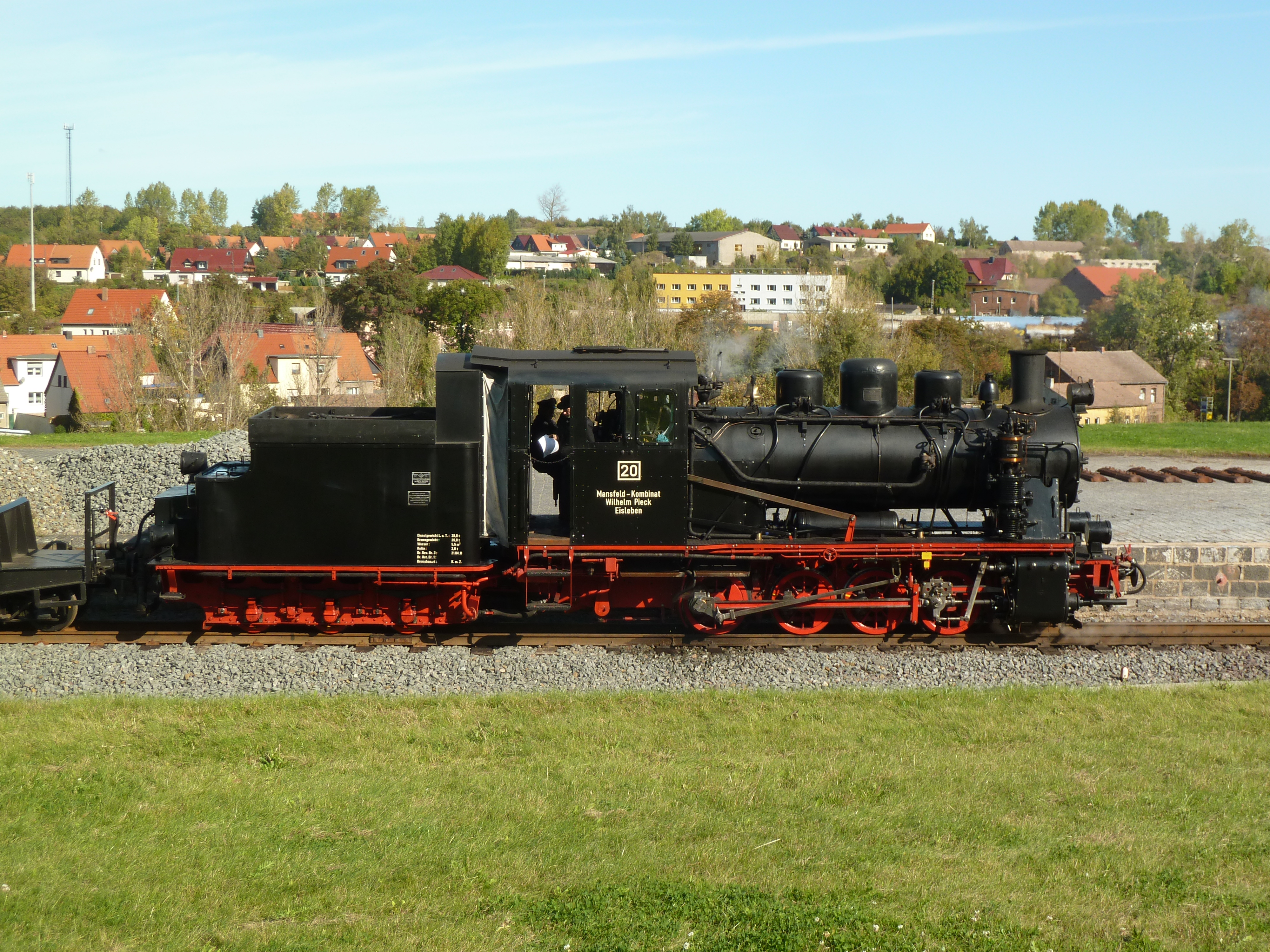 Dampflok 20" ex ГР-320 (LKM 15417/1951) der Mansfelder Bergwerksbahn in Hettstedt 09.Oktober 2011